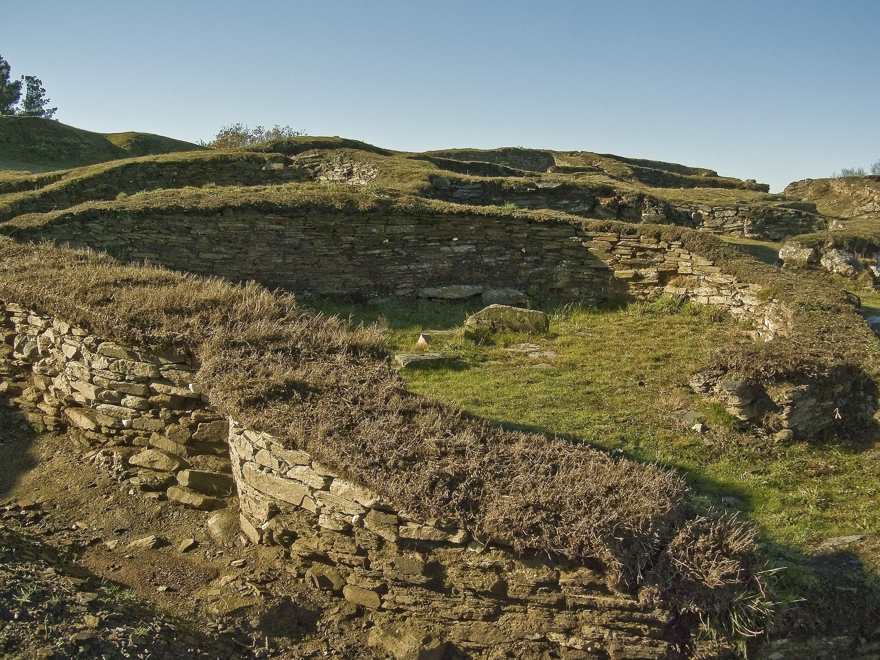 Habitación con lareira 1 do Castro de Viladonga